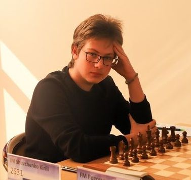 Кирилл Сергеевич Шевченко, второй этап европейского юношеского Гран-при